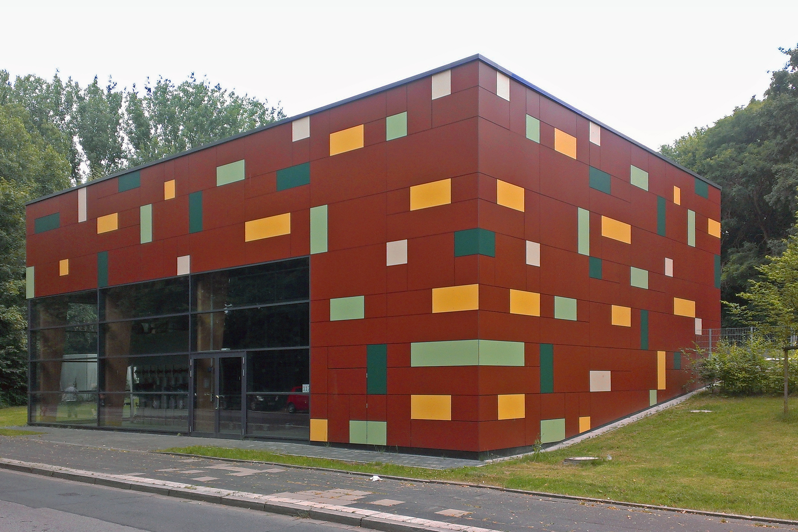 Biomasse-Heizwerk für den Grugapark und das Grugabad in Essen